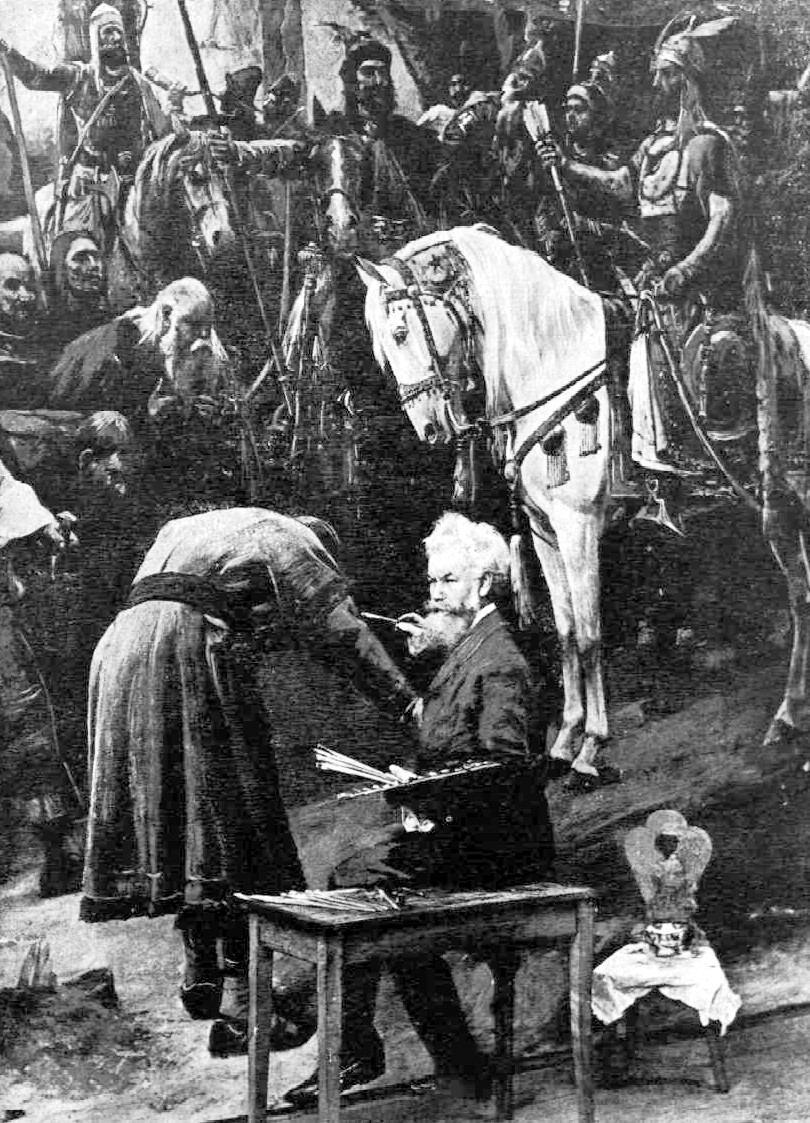 Munkácsy Mihály párizsi műtermében. Fénykép